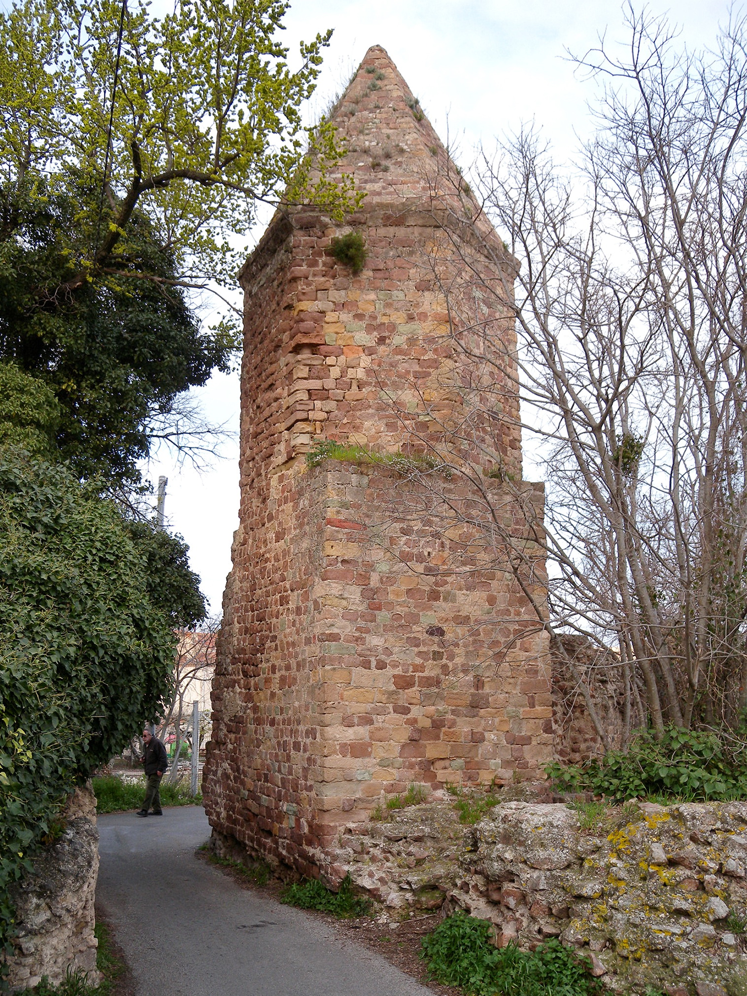 Lantrene d'Auguste (phare du port romain de Fréjus)